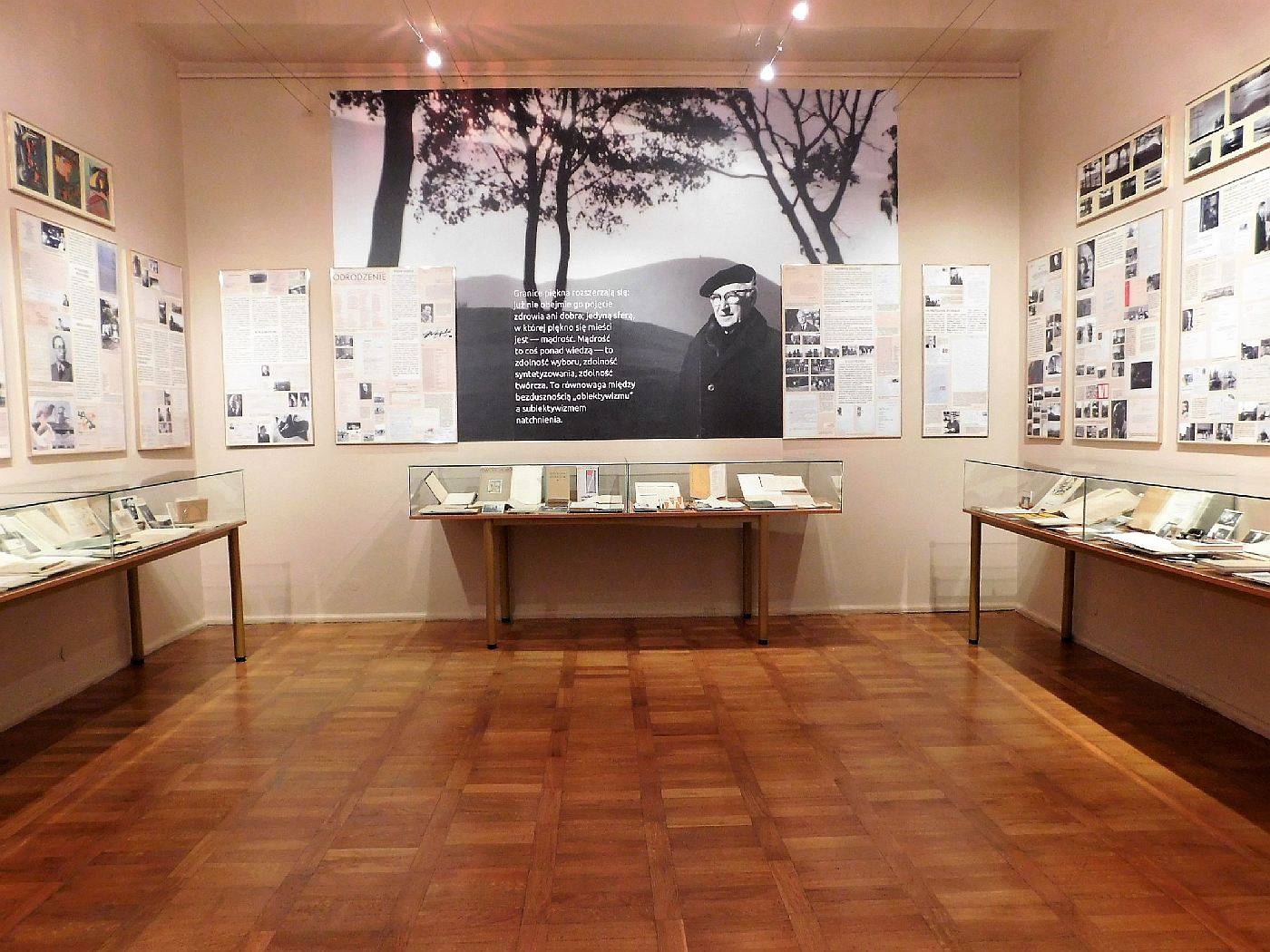 Pokój Pamięci Poety Mariana Jachimowicza w PiMBP "Bibliotece pod Atlantami" w Wałbrzychu